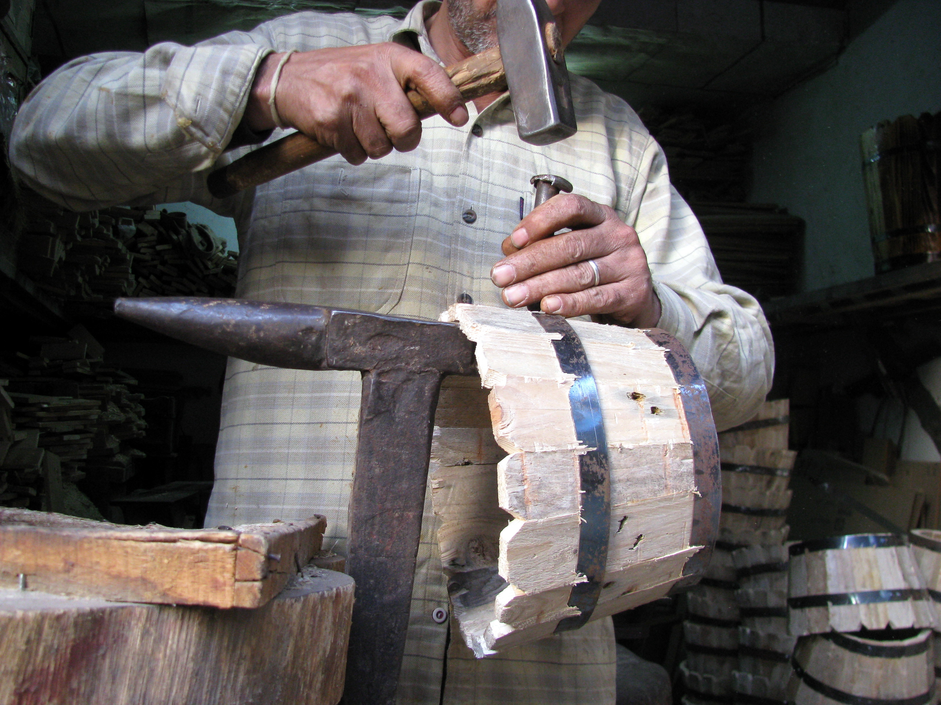 Making wooden buckets, Cairo